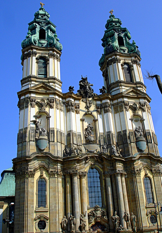 Krzeszów - kościół parafialny Wniebowzięcia NMP, dawniej klasztorny NMP Łaskawej (zabytek nr rejestr. A/1989/489 z 20.02.1959)